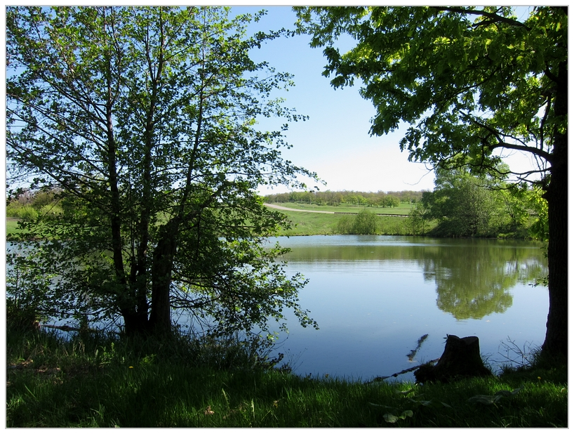 Пруд около Базарно-Карабулакского тракта